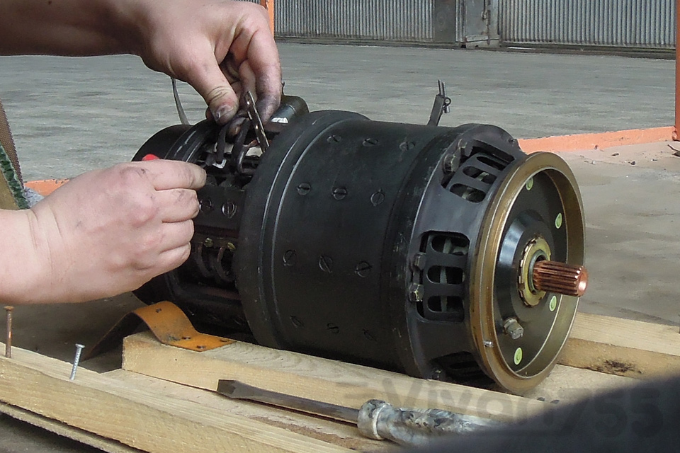 Авиационный стартёр-генератор постоянного тока ГС-12ТОК, замена щёток